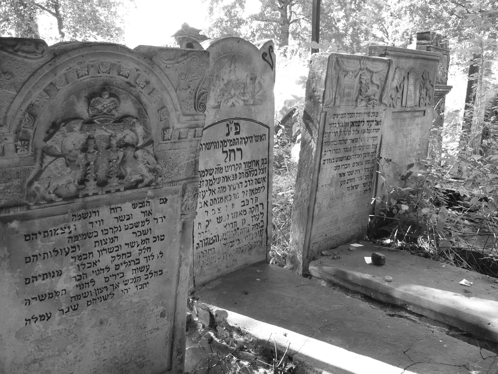 Macewy na cmentarzu żydowskim w Radomsku